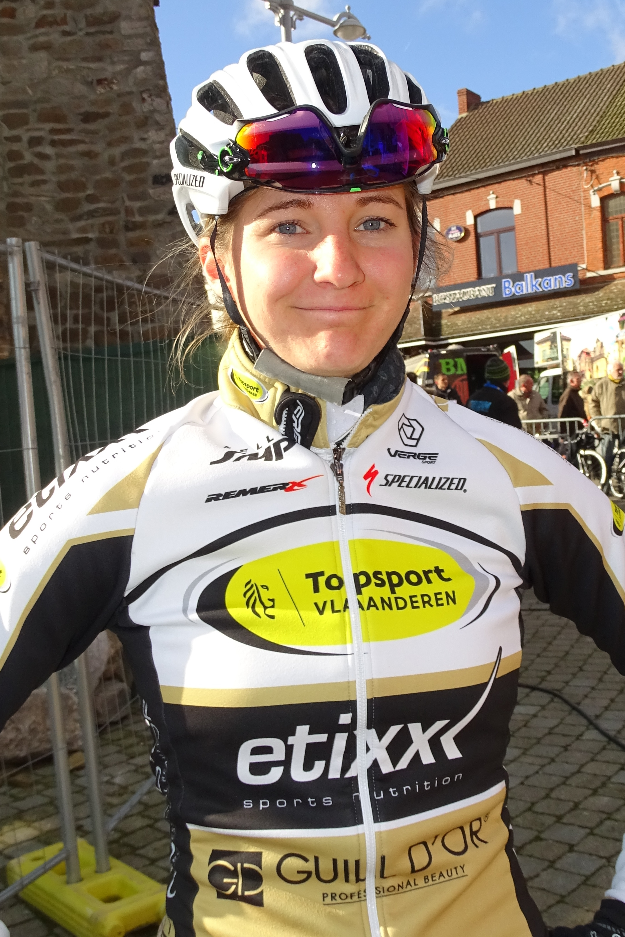 Reportage réalisé le mercredi 2 mars à l'occasion du départ du Samyn des Dames 2016 et du Samyn 2016 à Quaregnon, Belgique.